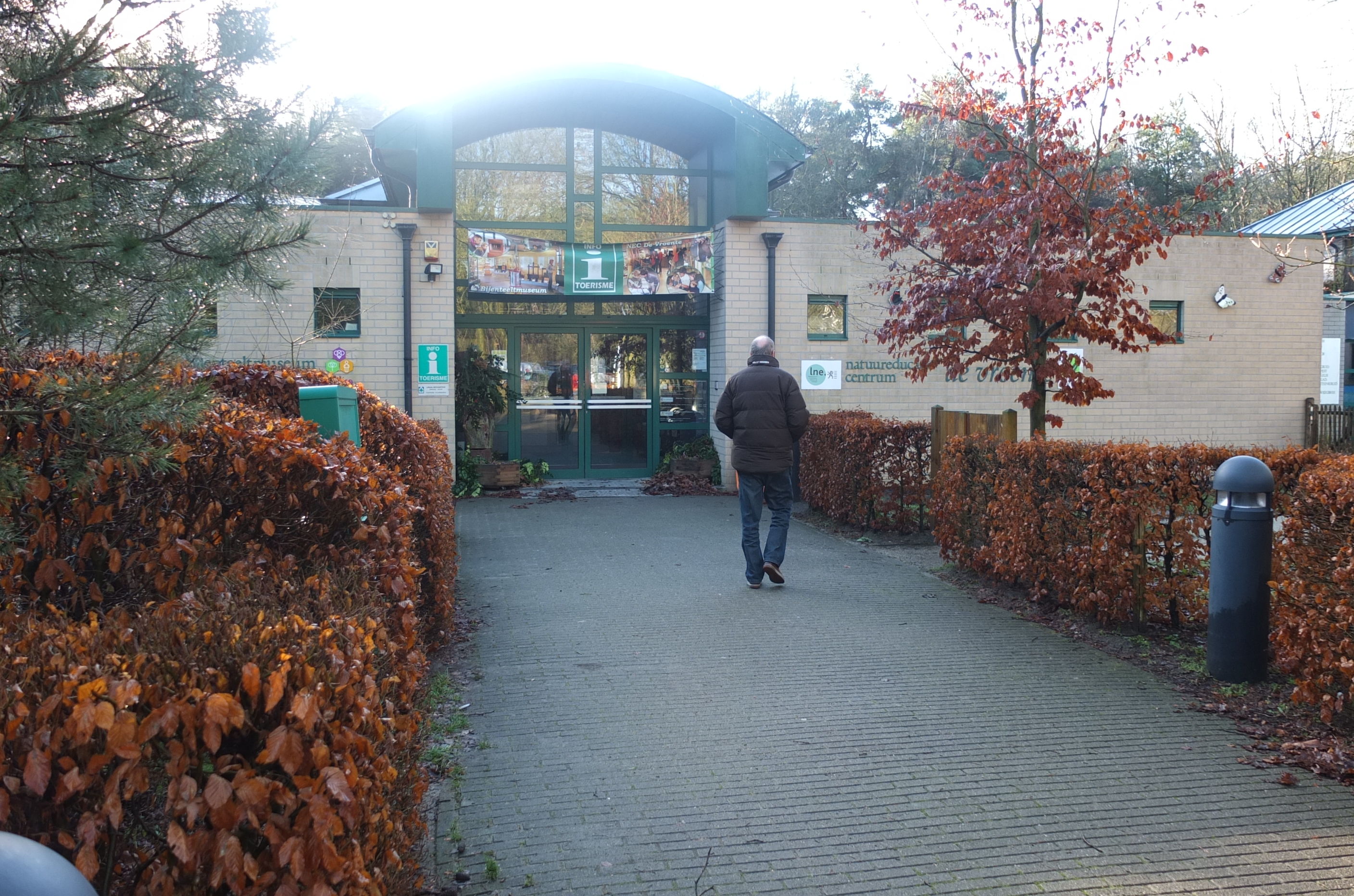 Infocentrum de Vroente nabij Kalmthout